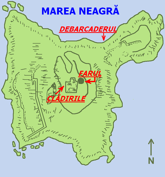 Schița insulei Șerpilor